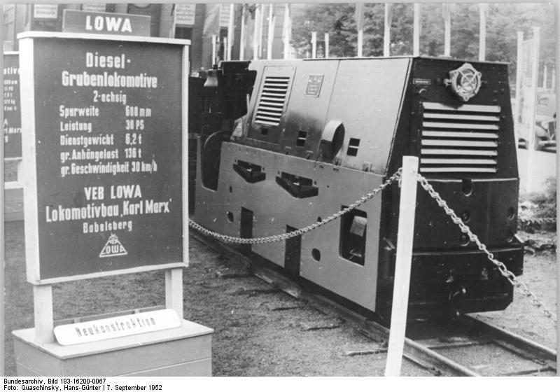 Leipziger Messe, Ausstellungslok ADN-ZB Quaschinsky 7.9.1952 Leipziger Messe 1952 - Schaufenster des friedlichen Aufbaus. Vom 7. - 17. September 1952 findet die internationale Leipziger Messe als grosse Technische Messe und Mustermesse in 13 Messehallen (75.000 qm), auf einem ausgedehnten Freigelände (25.000 qm) und in 15 Messehäusern (80.000 qm) statt. VVB Lowa auf dem Freigelände der Technischen Messe. Neukonstruktion einer Diesel-Grubenlokomotive des Lokomotivbaues "Karl Marx", Babelsberg.